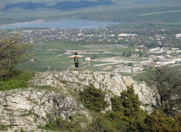 Вид с Агармыша на старокрымскую долину